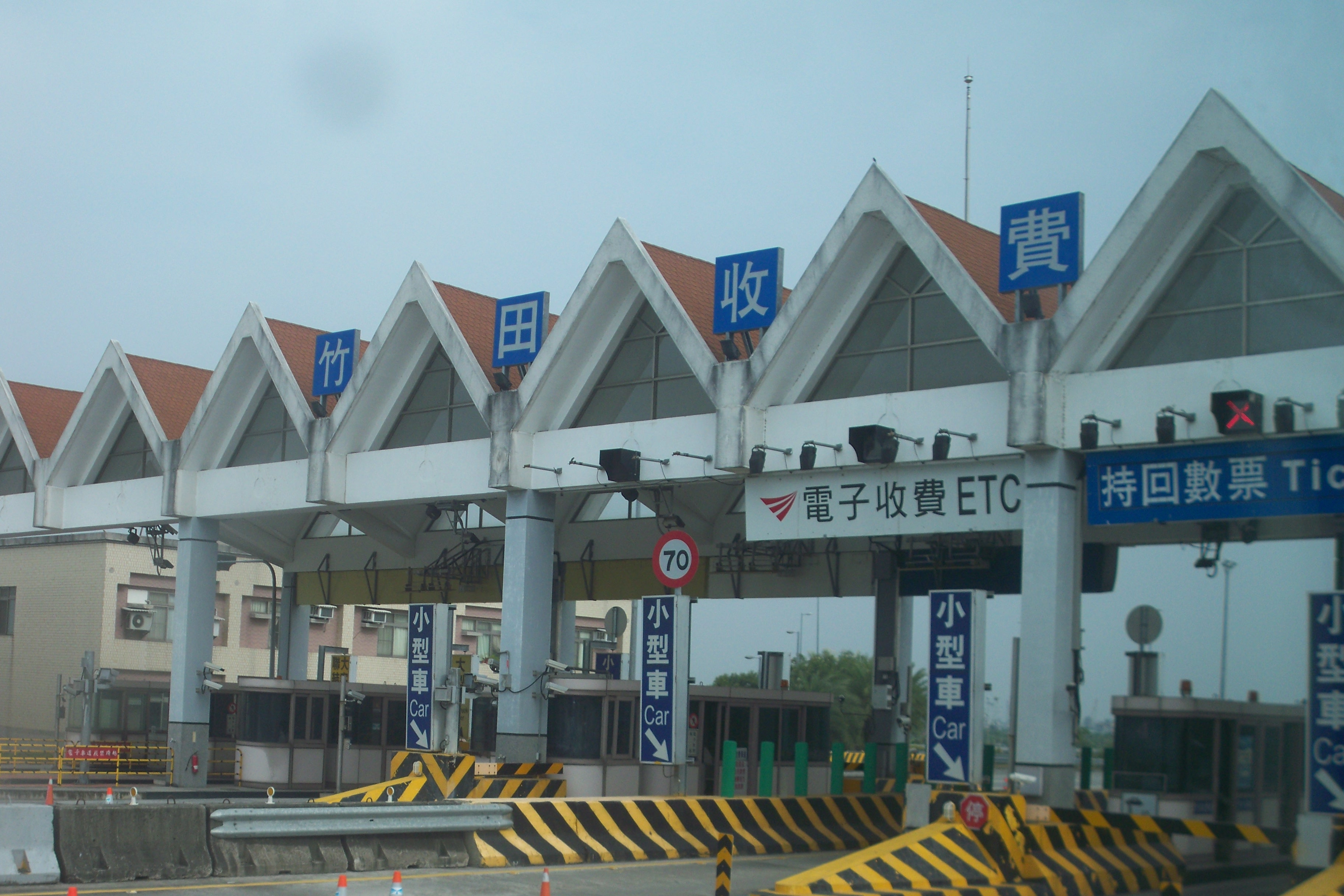 福爾摩沙高速公路 竹田收費站